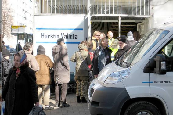 Hurstin jakopaikka